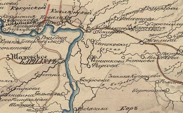 Деревня Санникова и ближайшие населённые пункты. Фрагмент карты Алтайского горного округа Томской губернии (1835 г.)